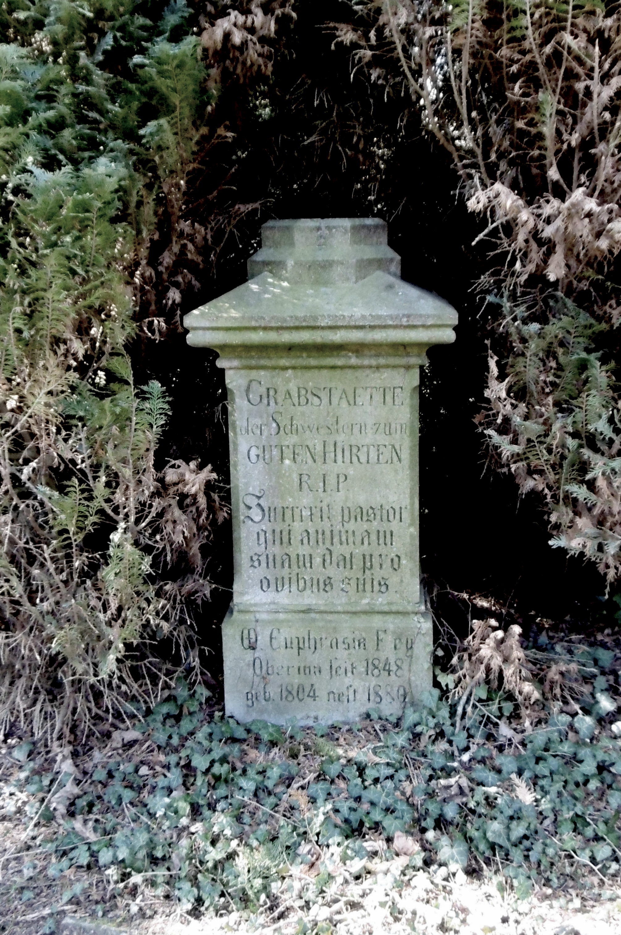 Grabstätte der Schwestern vom Guten Hirten aus der Niederlassung Aachen mit ihrer ersten Oberin Helena Euphrasia Fey